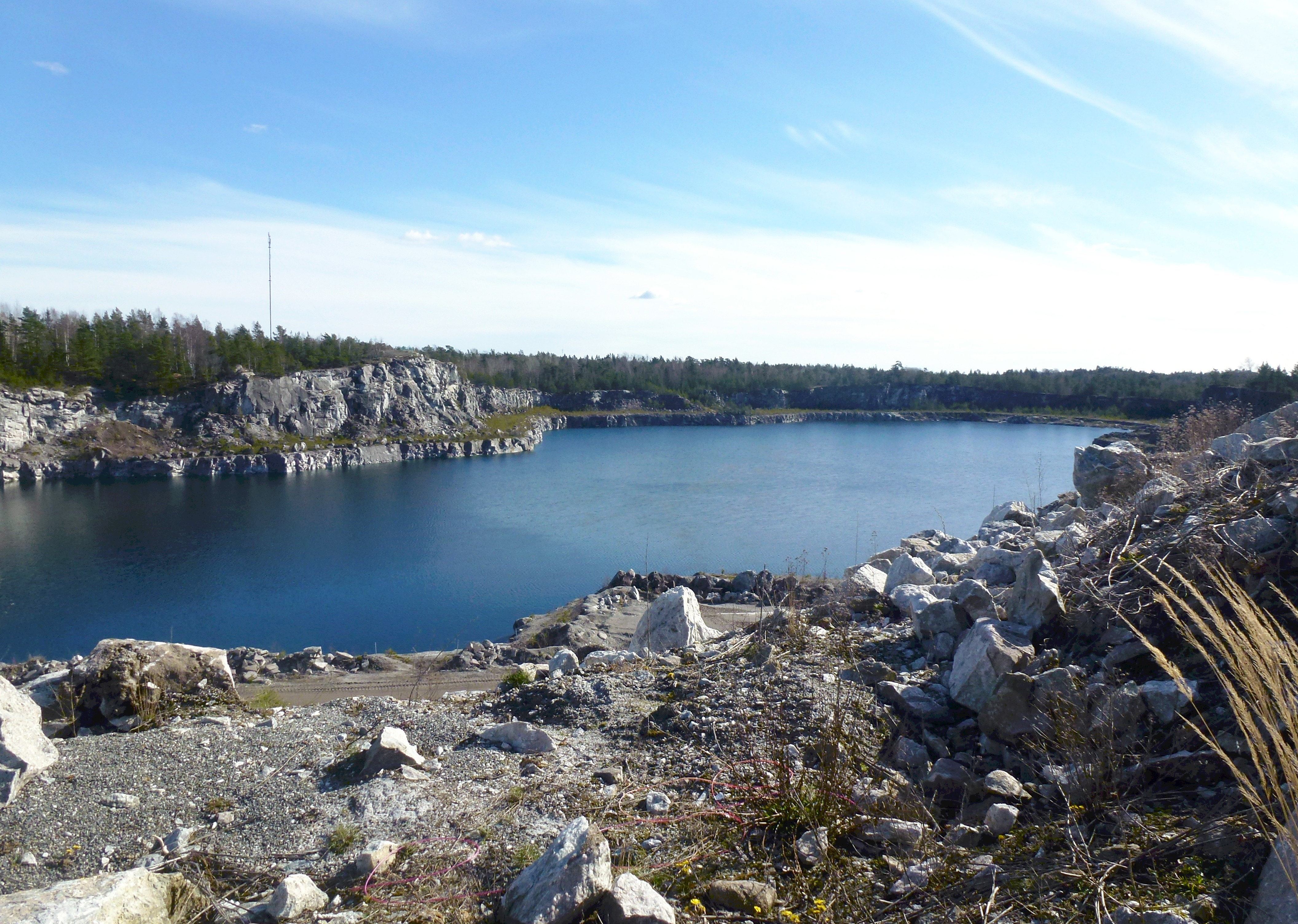 Stora Vika kalkstensbrott